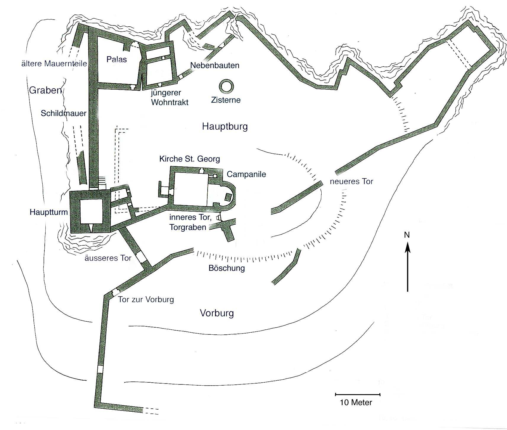 Plan der Anlage